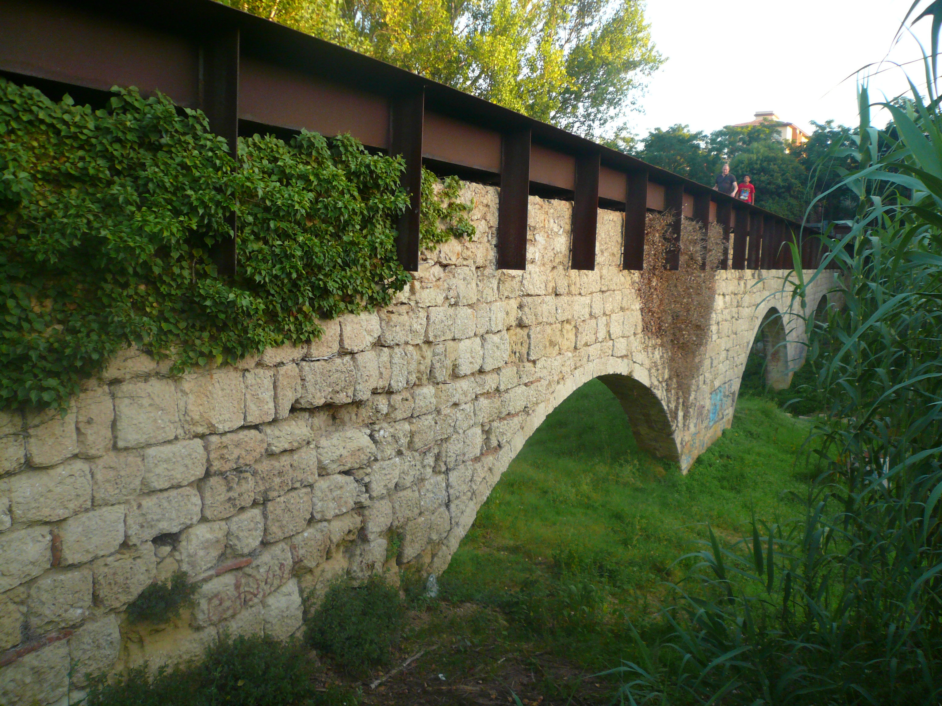 Pont de Can Vernet (Sant Cugat del Vallès) Object location41° 28′ 42″ N, 2° 04′ 36″ E